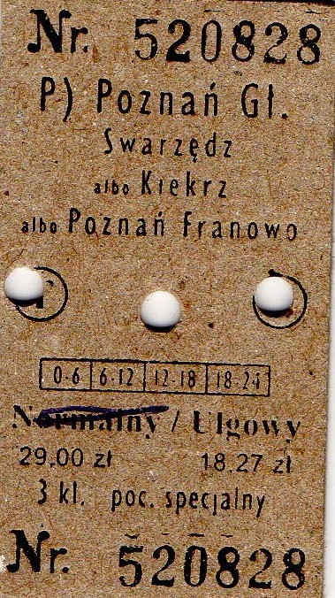 Bilet kartonowy z Poznania do Swarzędza, Kiekrza i Franowa.